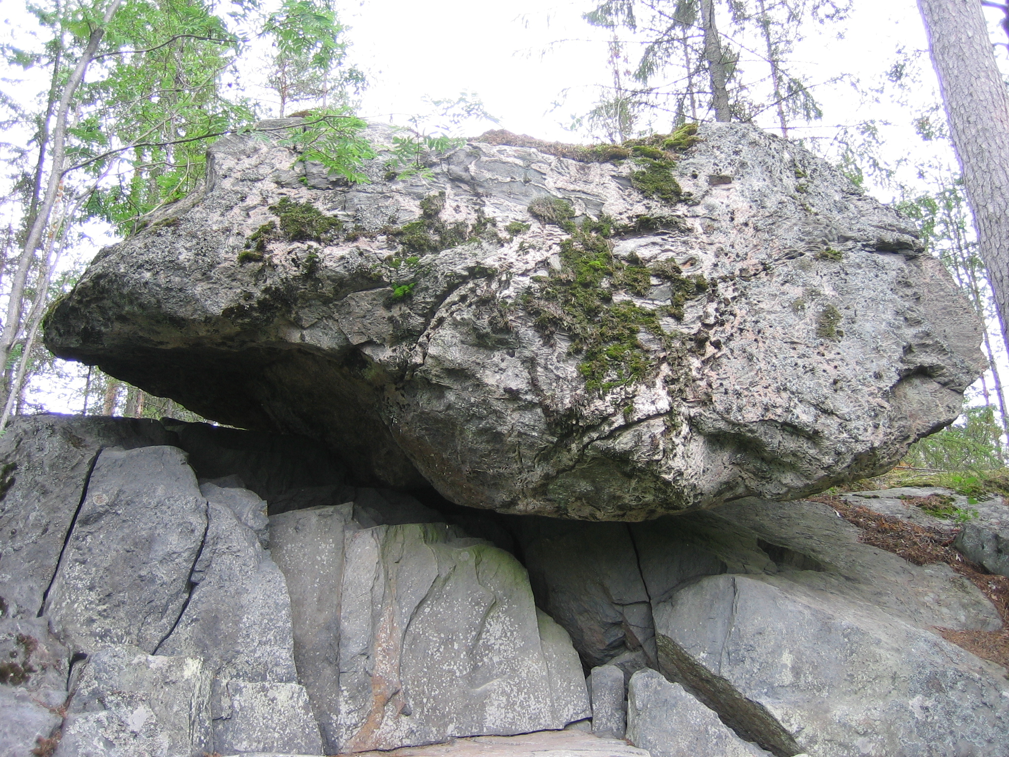 Kiikkukivi Alavieskan Jukulaisen kylällä.